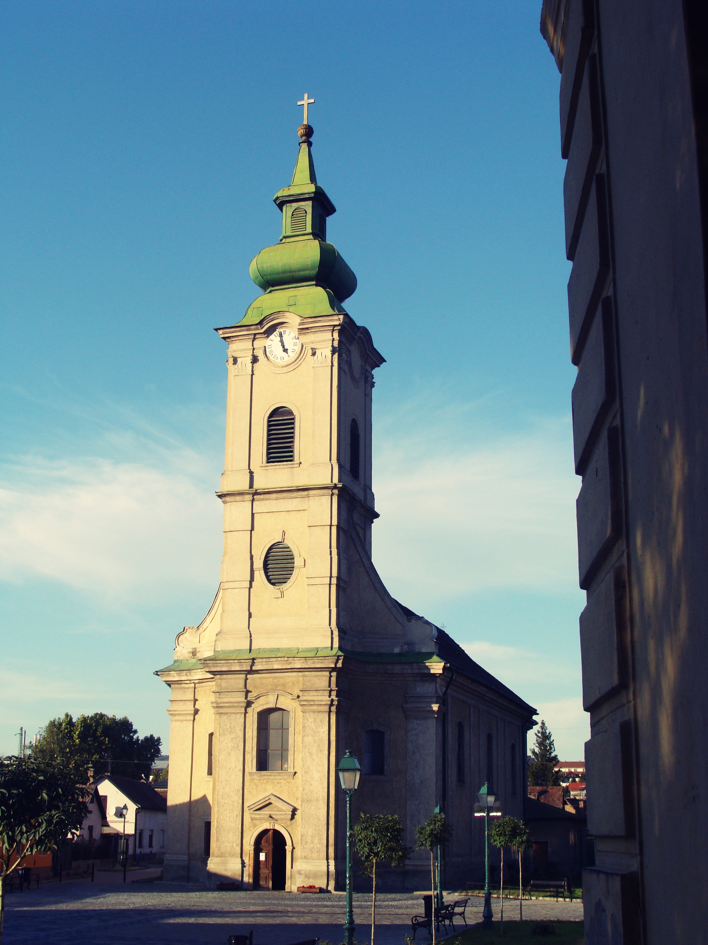 A szobi Szent László római katolikus templomot ábrázoló kép, mely a Szent László tér felől készült.